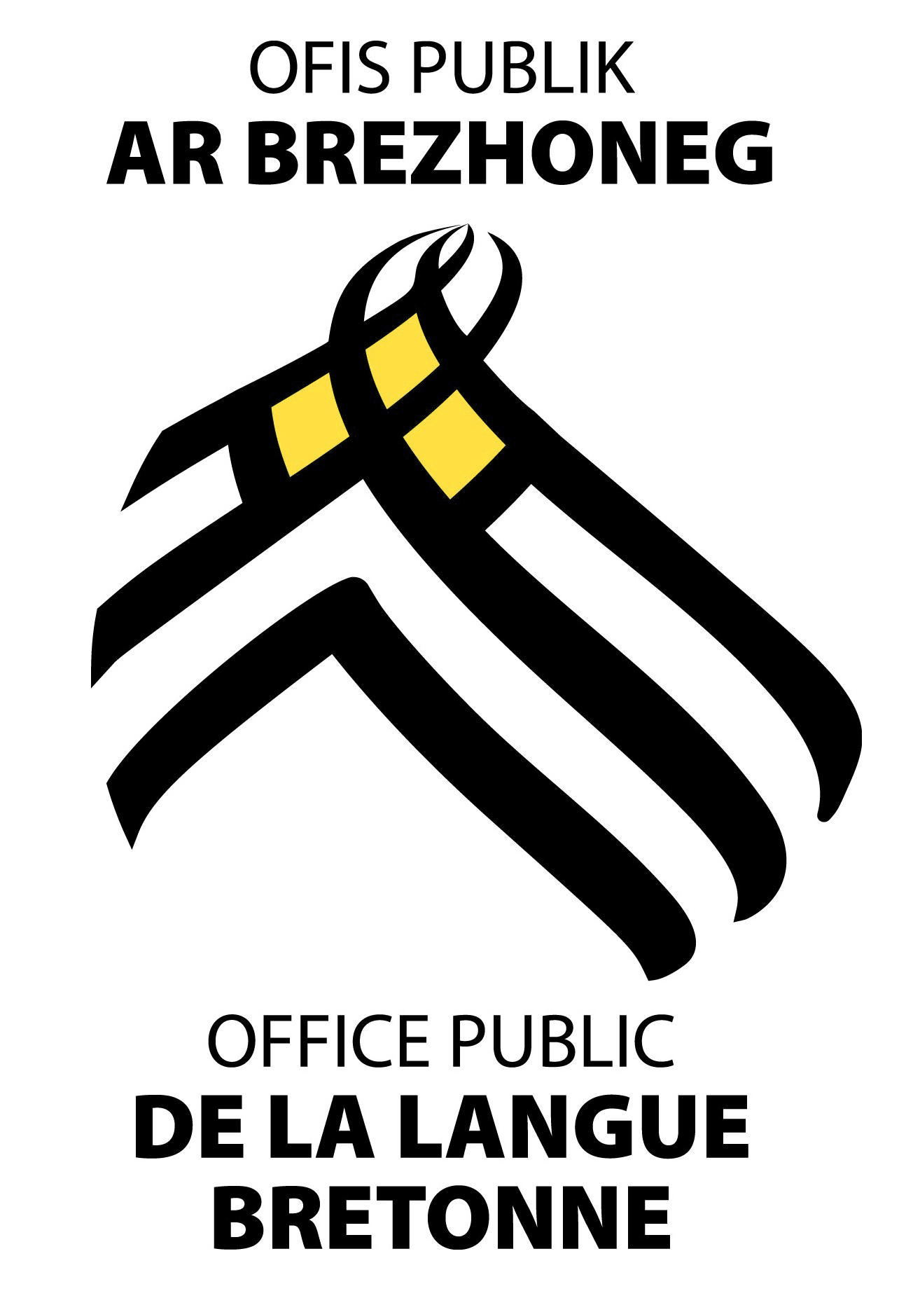 LogoOPAB